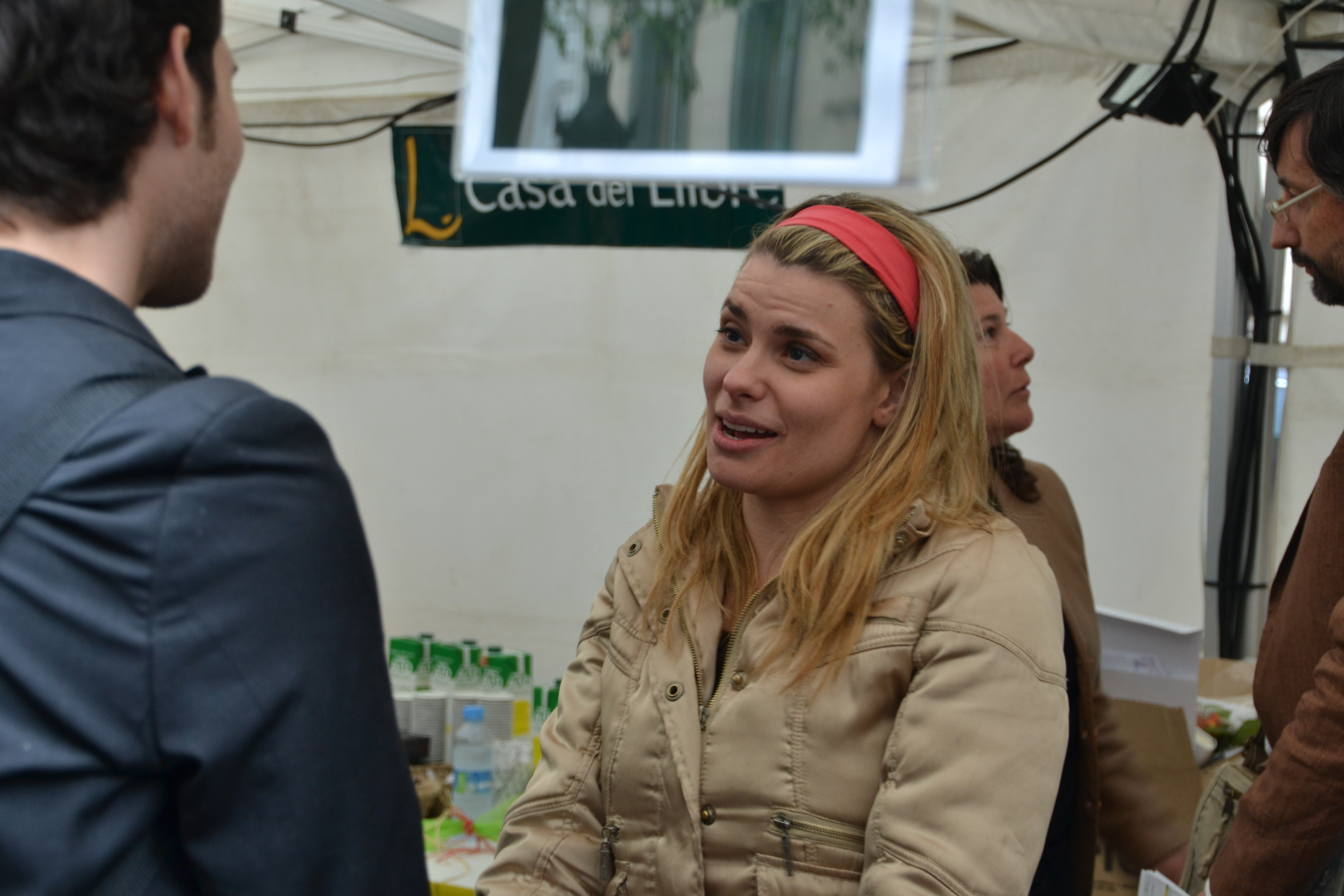 Maria Lapiedra